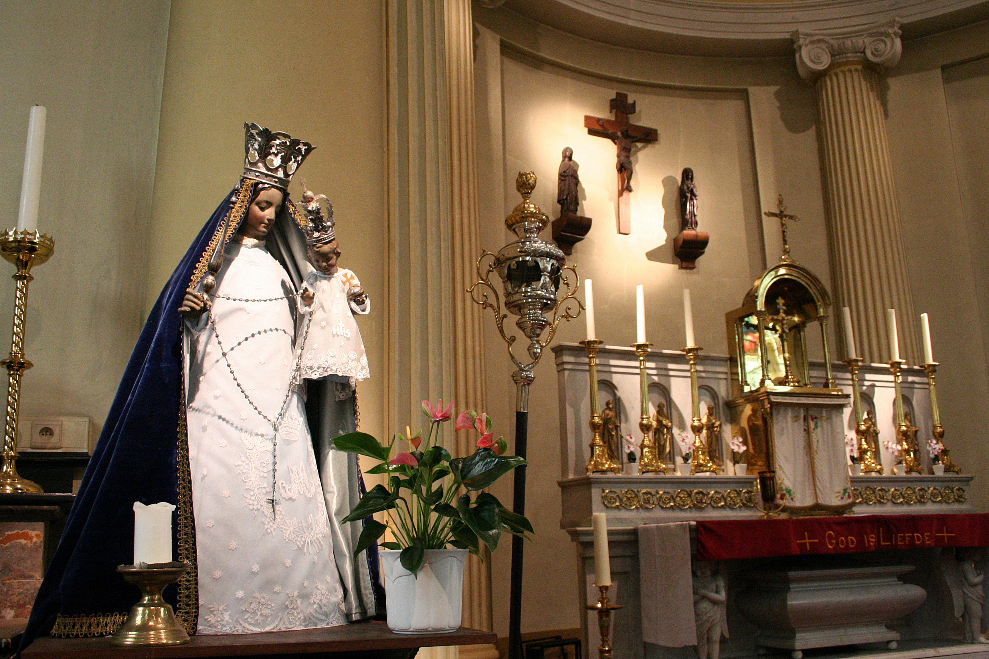 Wolfsdonk - Sint-Antonius Abt Kerk - Zicht op altaar in hoogkoor, calvarie vanah het Onze-Nieve-Vrouwaltaarn